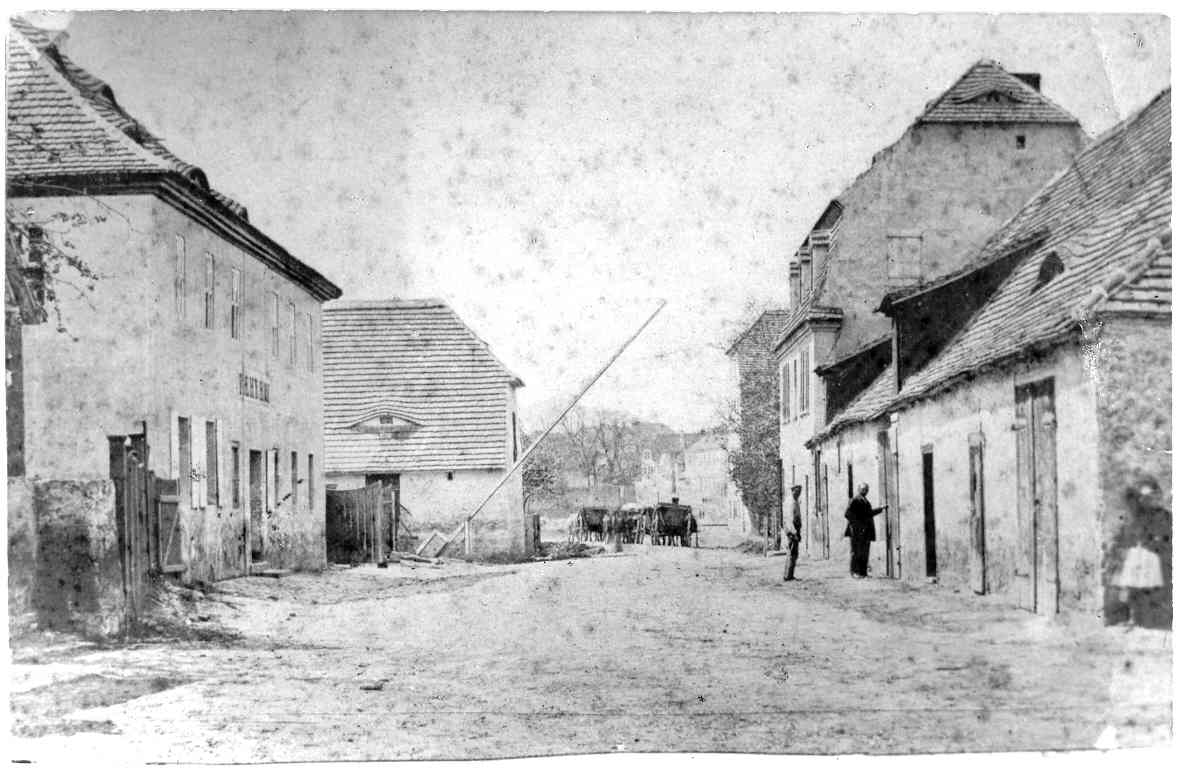 Fährhof mit Schranke (Aufnahme im 19. Jh.) (eigene Arbeit)